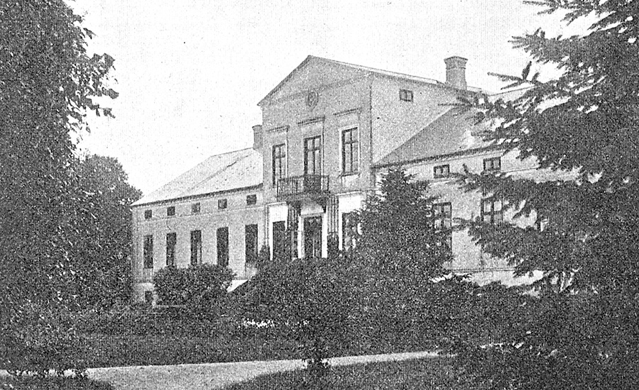 Sellebjerg er en gammel Hovedgård, som nævnes første gang i 1231. Sellebjerg var krongods fra 1231 til 1536. Gården er beliggende ca. 10 km øst for Odense i Birkende Sogn, Bjerge Herred, Langeskov Kommune. Hovedbygningen er opført i 1845, men er nedrevet i 1961-1964, det er en sidefløj til den gammel bygning, der nu er ombygget til Hovedbygning.